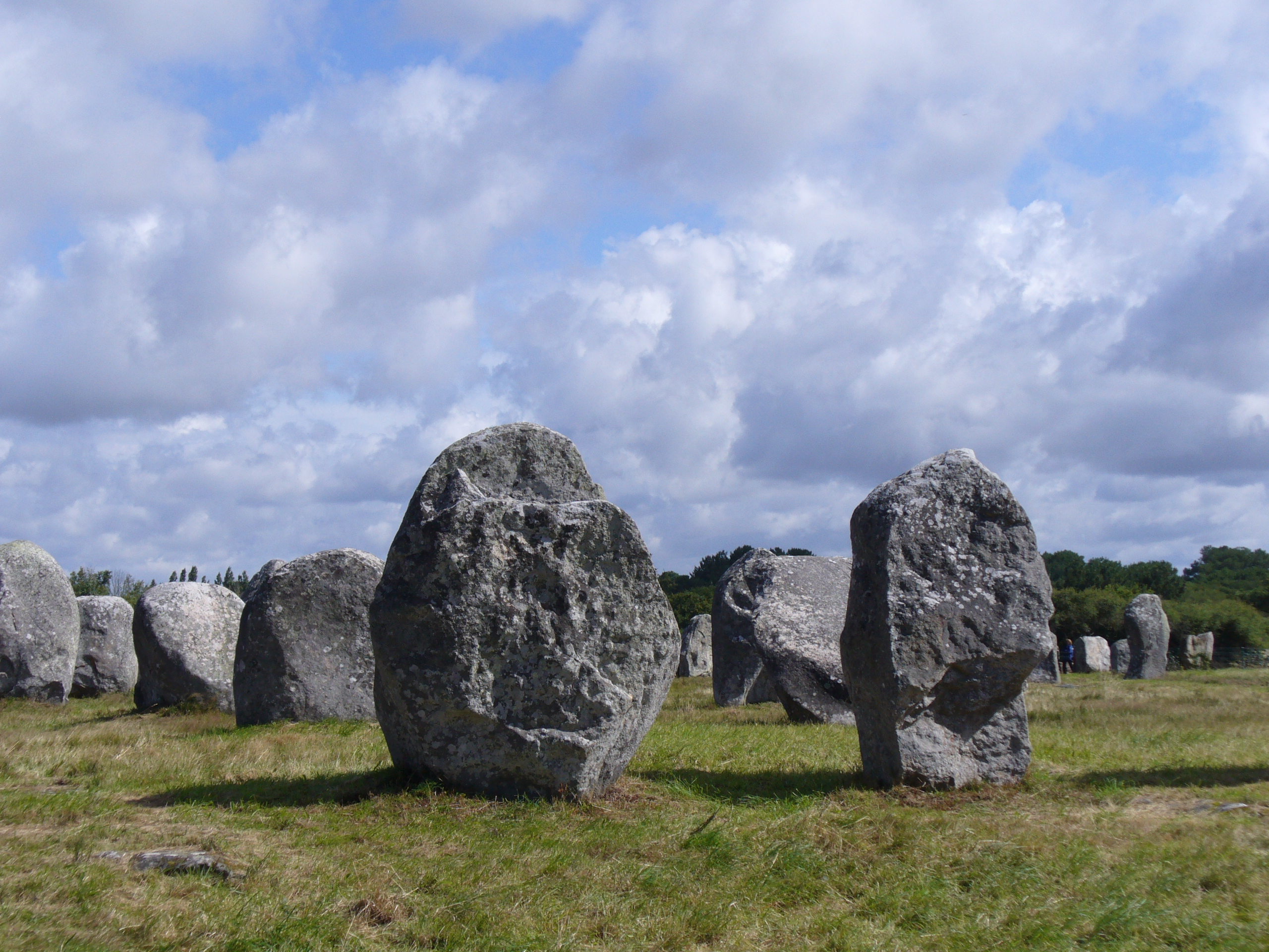 1099 Menhire,bis zu 4 Meter hoch,von Ost nach West in 1167 Meter Langen Alignements(Steinreihen) in einem Halbkreis(Cromlechs) endend. (Jungsteinzeit, Neolithikum ,Neolithic ,Néolithique 4500-2300 v.Chr.) Megalithanlage von Le Ménec, Carnac ,Departement Morbihan ,Bretagne